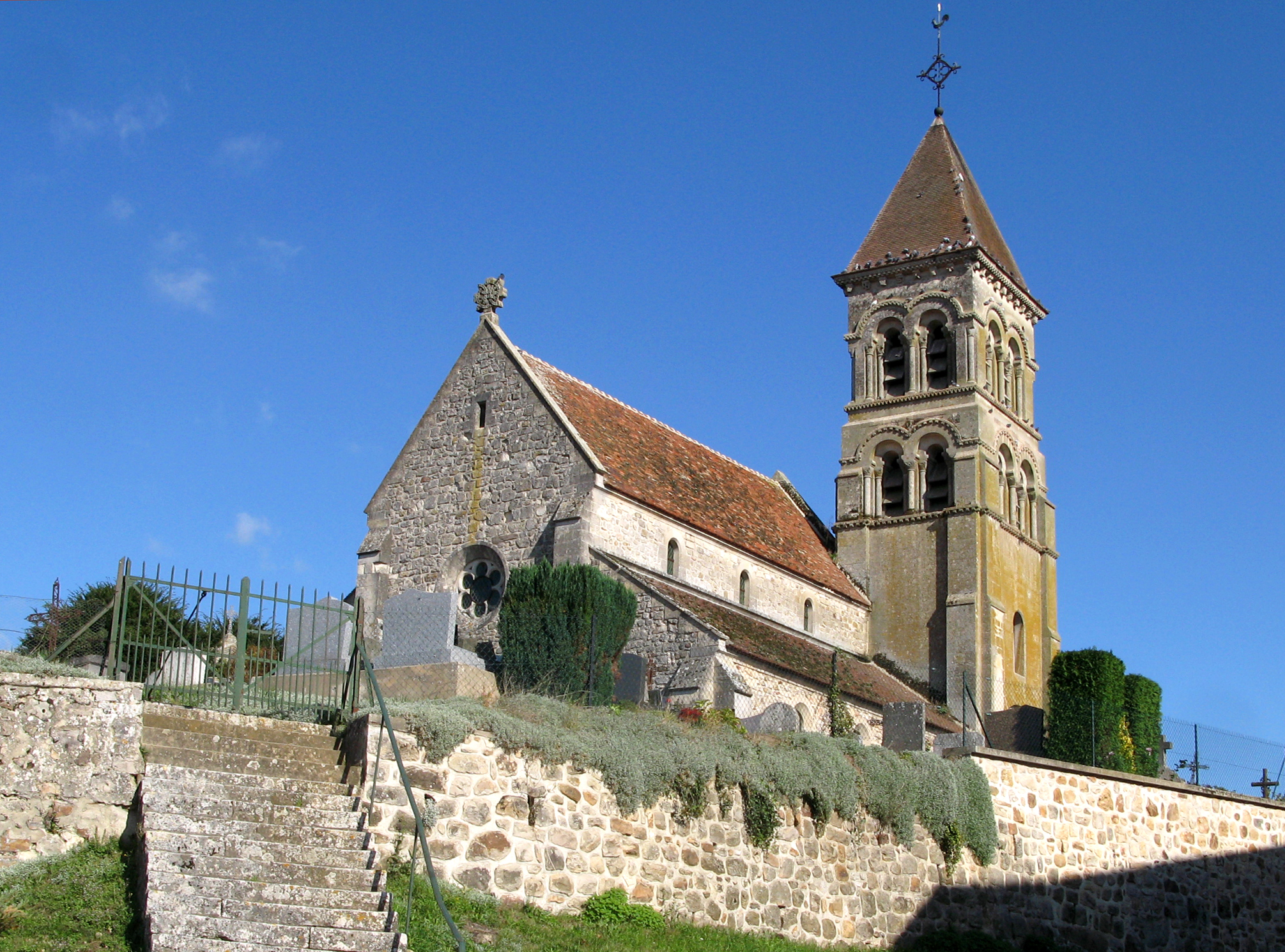 Oulchy-la-Ville (Aisne, France) - L'église Saint-Pierre. . . .